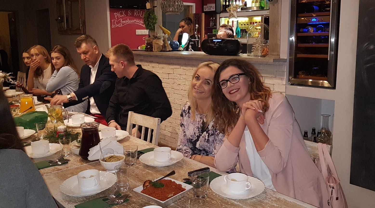 Stargard, 19.12.2017. Wigilia w klubie Spójnia